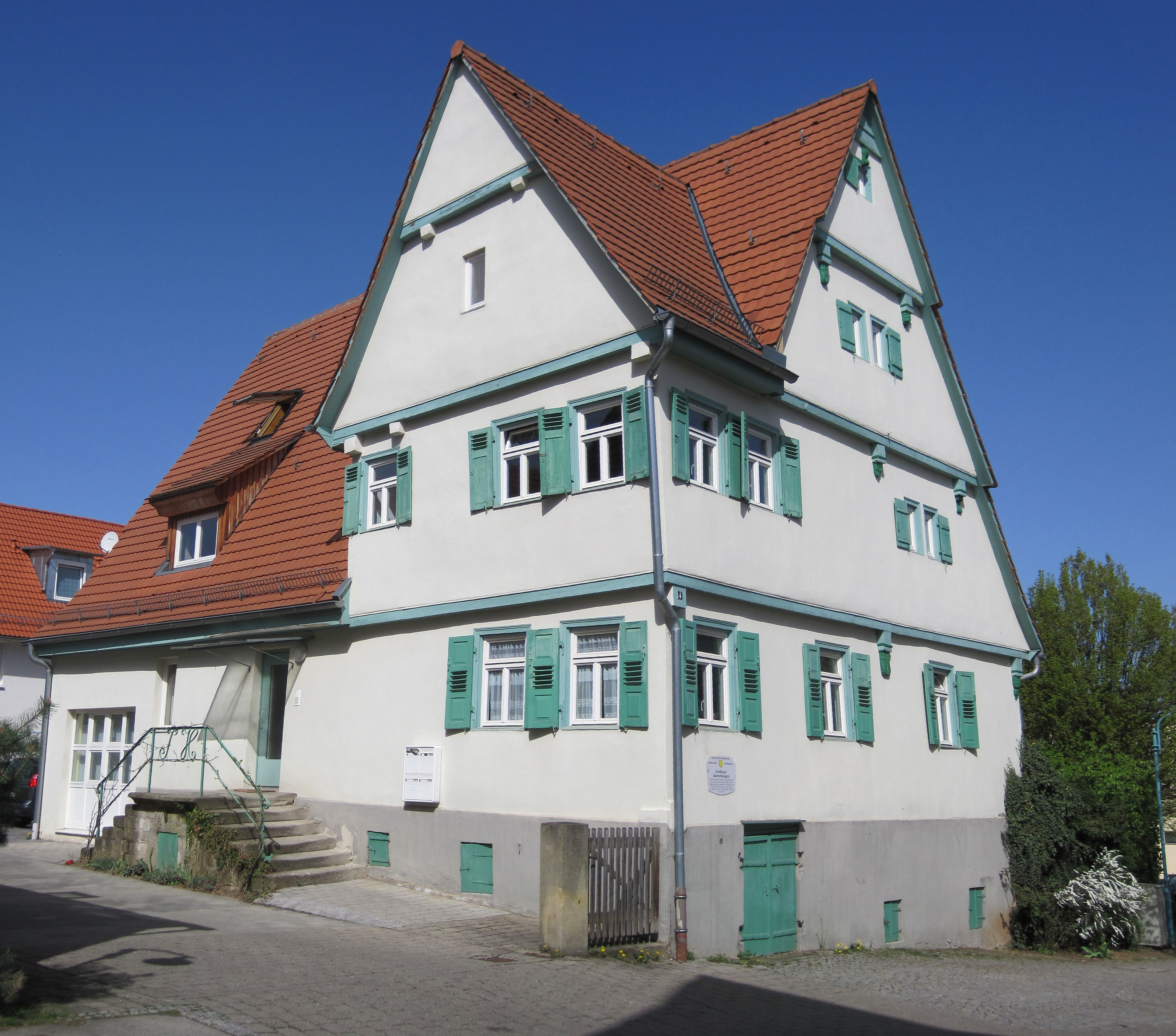 Fachwerkhaus in Filderstadt-Bonlanden, 1616 erbaut. Oberdorfstraße 4